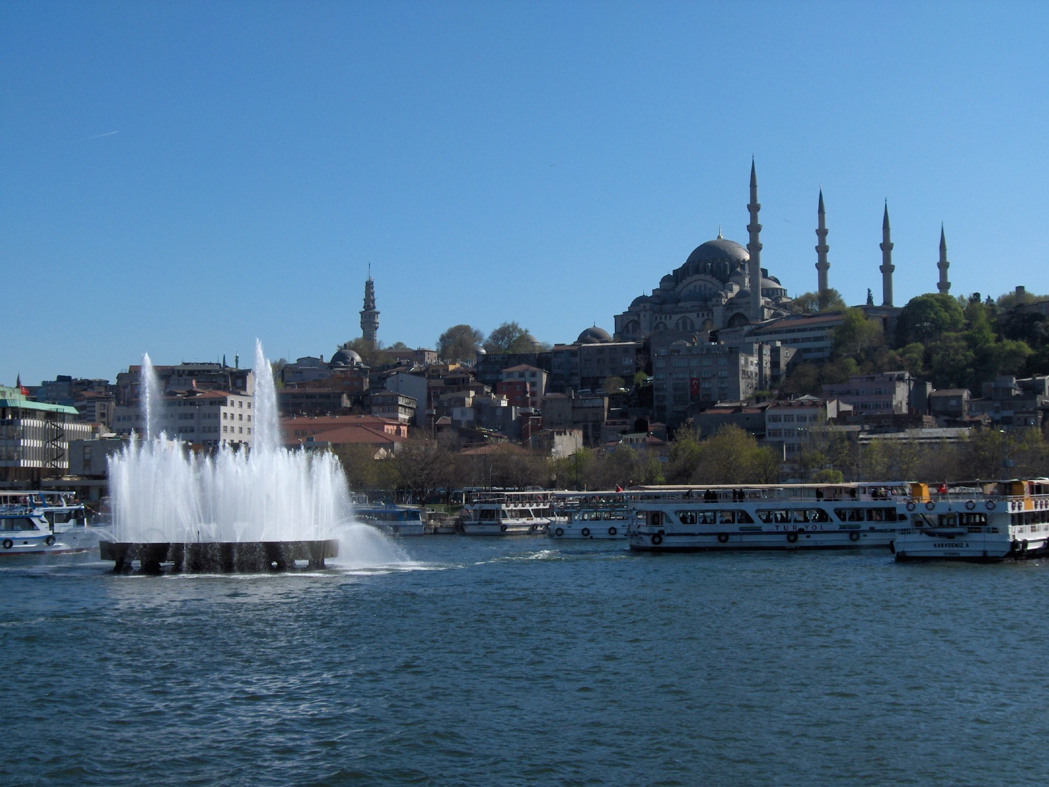 Süleymaniye Mosque; Istanbul, Turkey